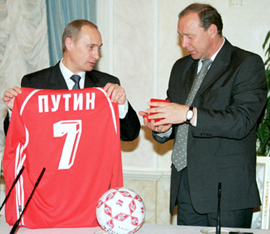 МОСКВА, КРЕМЛЬ. Встреча с тренерским составом и футболистами московского клуба «Спартак». Главный тренер «Спартака» Олег Романцев вручил Владимиру Путину «спартаковские» награды, мяч клуба с автографами игроков команды и футболку клуба.